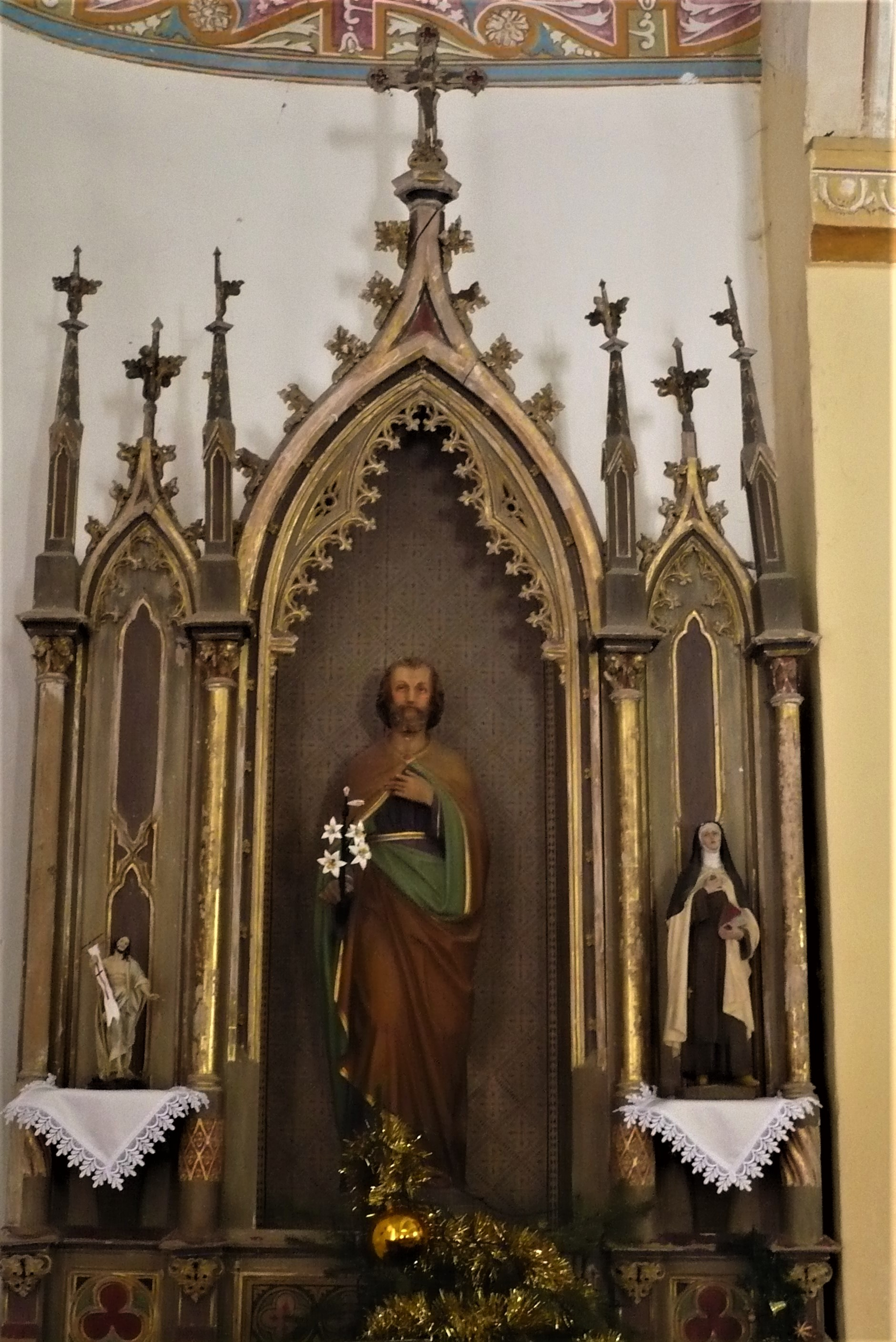 Ołtarz boczny